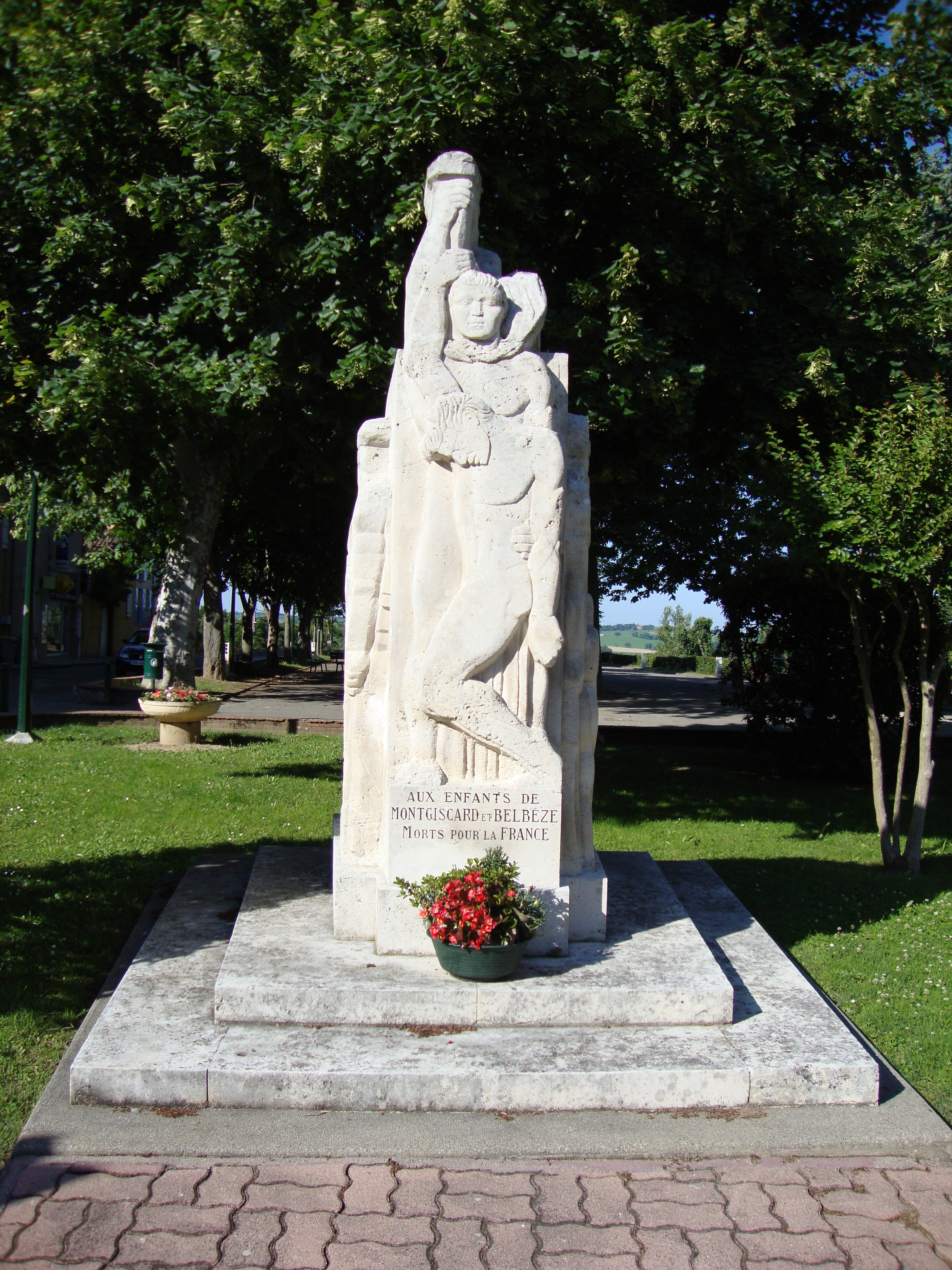 Montgiscard (Haute-Garonne, Fr) monument aux morts